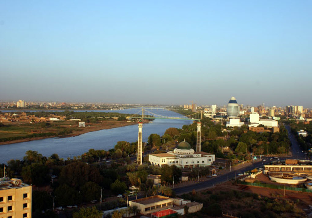 العاصمة السودانية